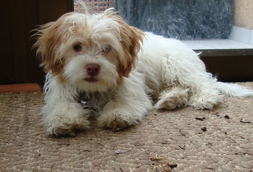 perro